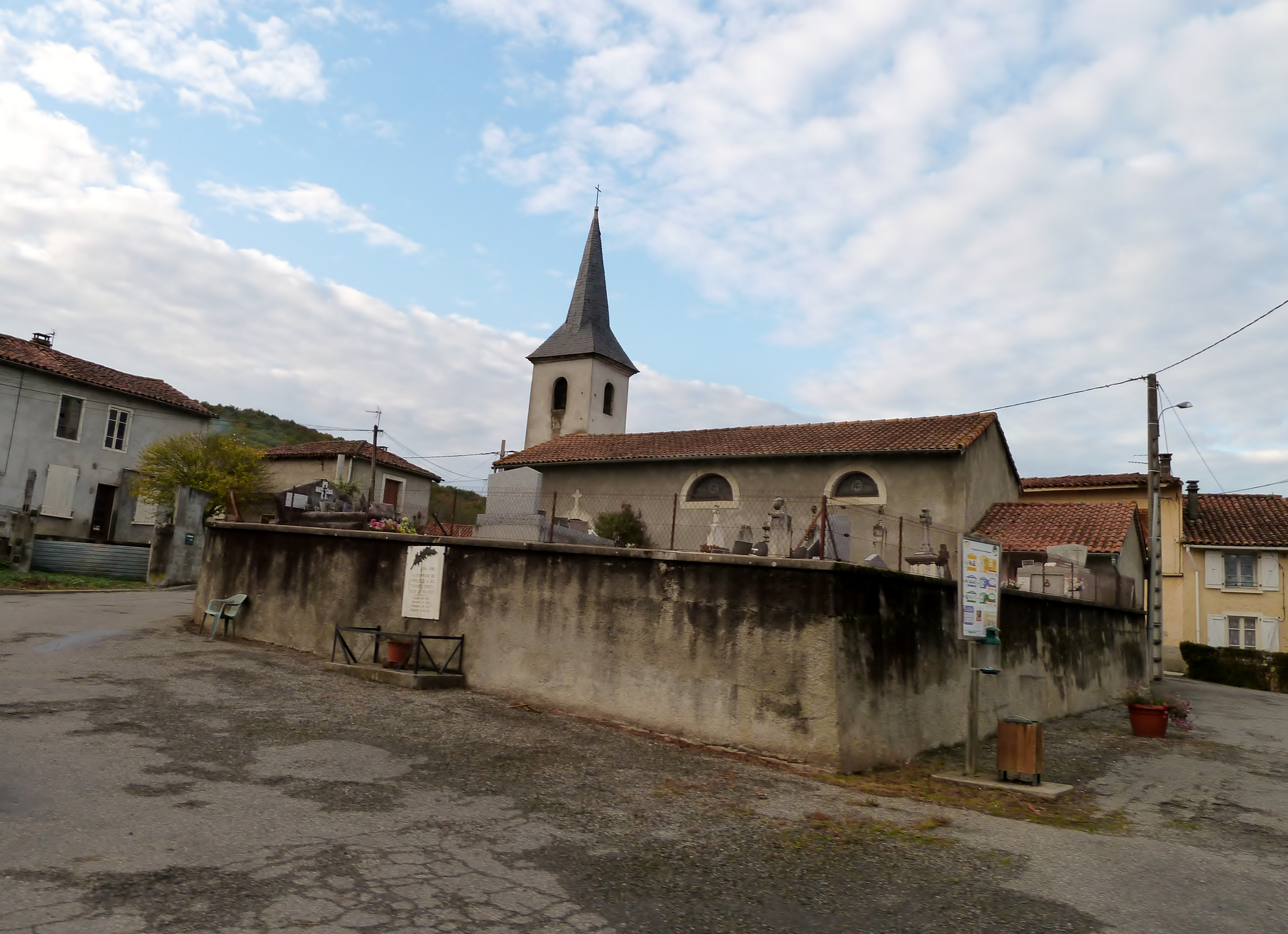 Église et cimetière de Rieucazé (Haute-Garonne, France).